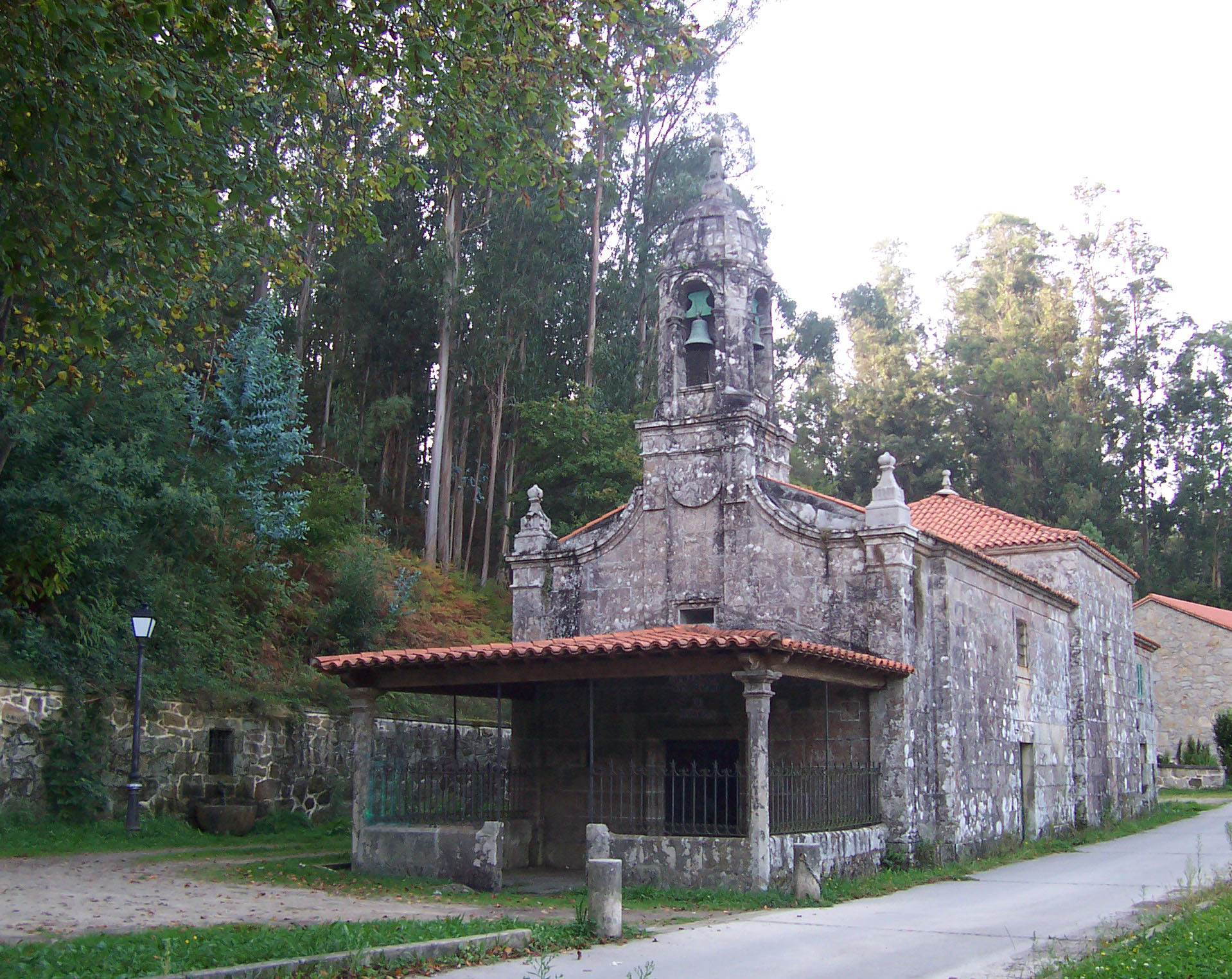 Capela de San Mauro de Barouta, Ames, Ames